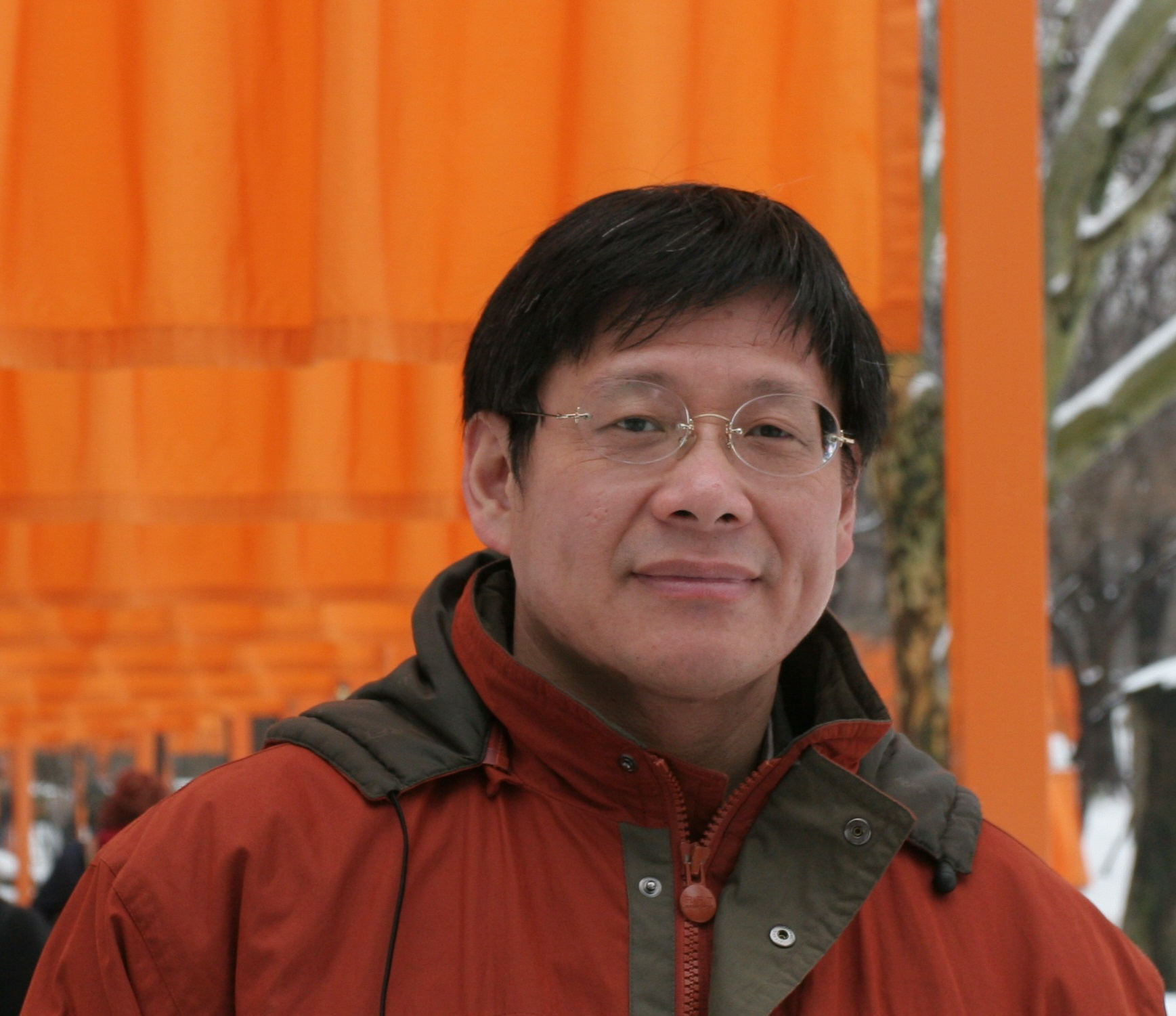 李劼2015年于纽约